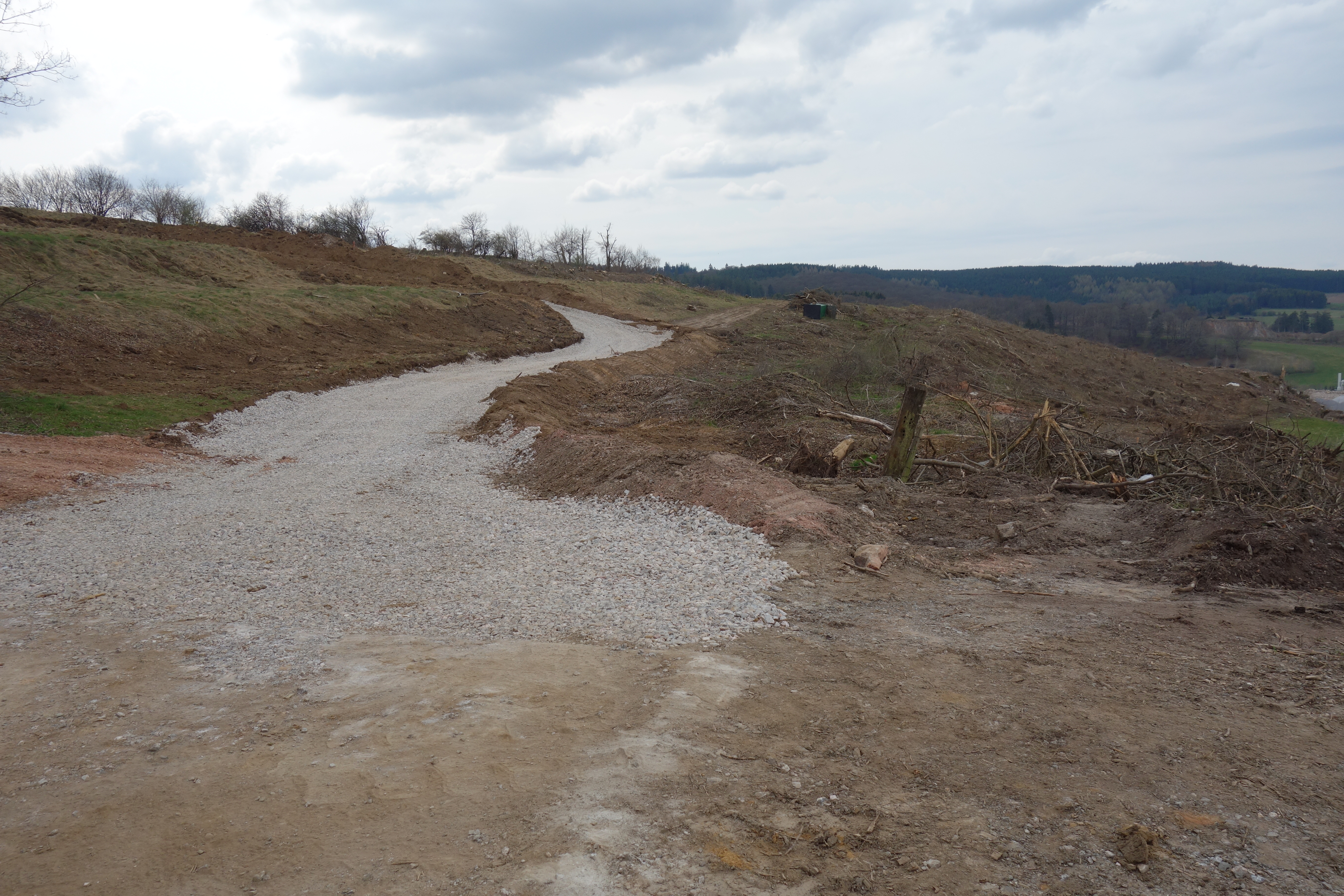 Gerodeter Gehölzbereich im Naturschutzgebiet Burhagen. Im Frühjahr 2017 wurden praktisch alle Gehölze im „Bereich für die oberirdische Gewinnung von Bodenschätzen“ abgesägt. Dieser Bereich war bei NSG-Ausweisung mit einer Befristung bis zum Abbaubeginn versehen worden. Nur an der Steinbruchkante bliebe einige wenige Gehölze belassen. In den geplanten Abbaubereich wurde Wege geschoben und mit Splitt befestigt.